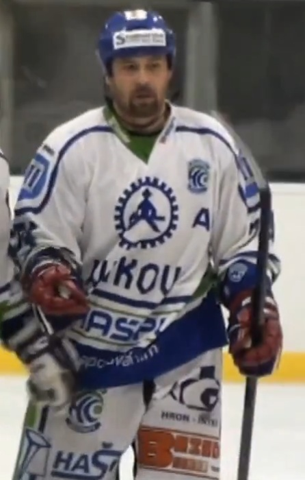 Martin Táborský (HC Hronov)